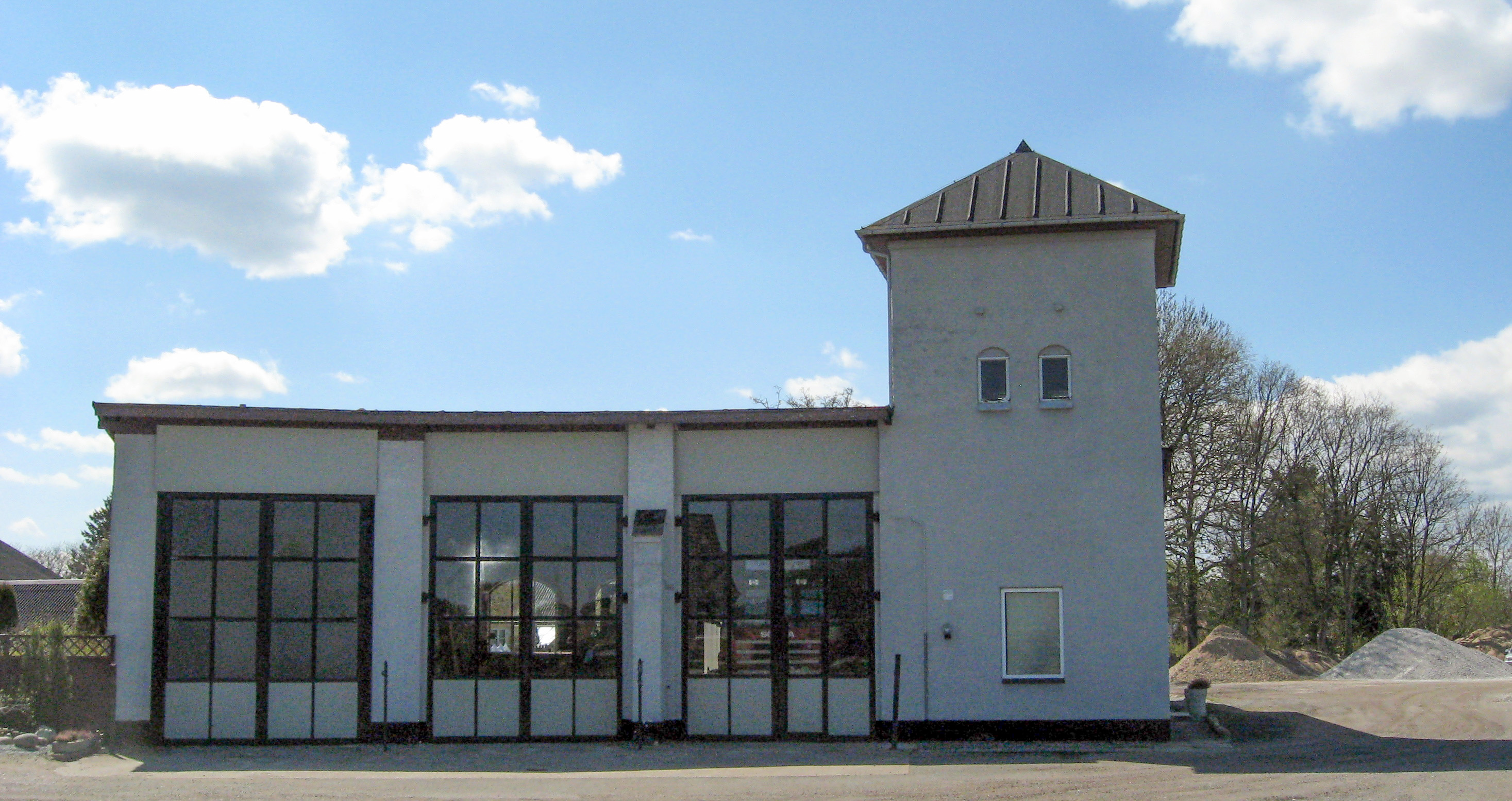 Den gamle remise (Hjørring-Hørby Jernbane) i Østervrå